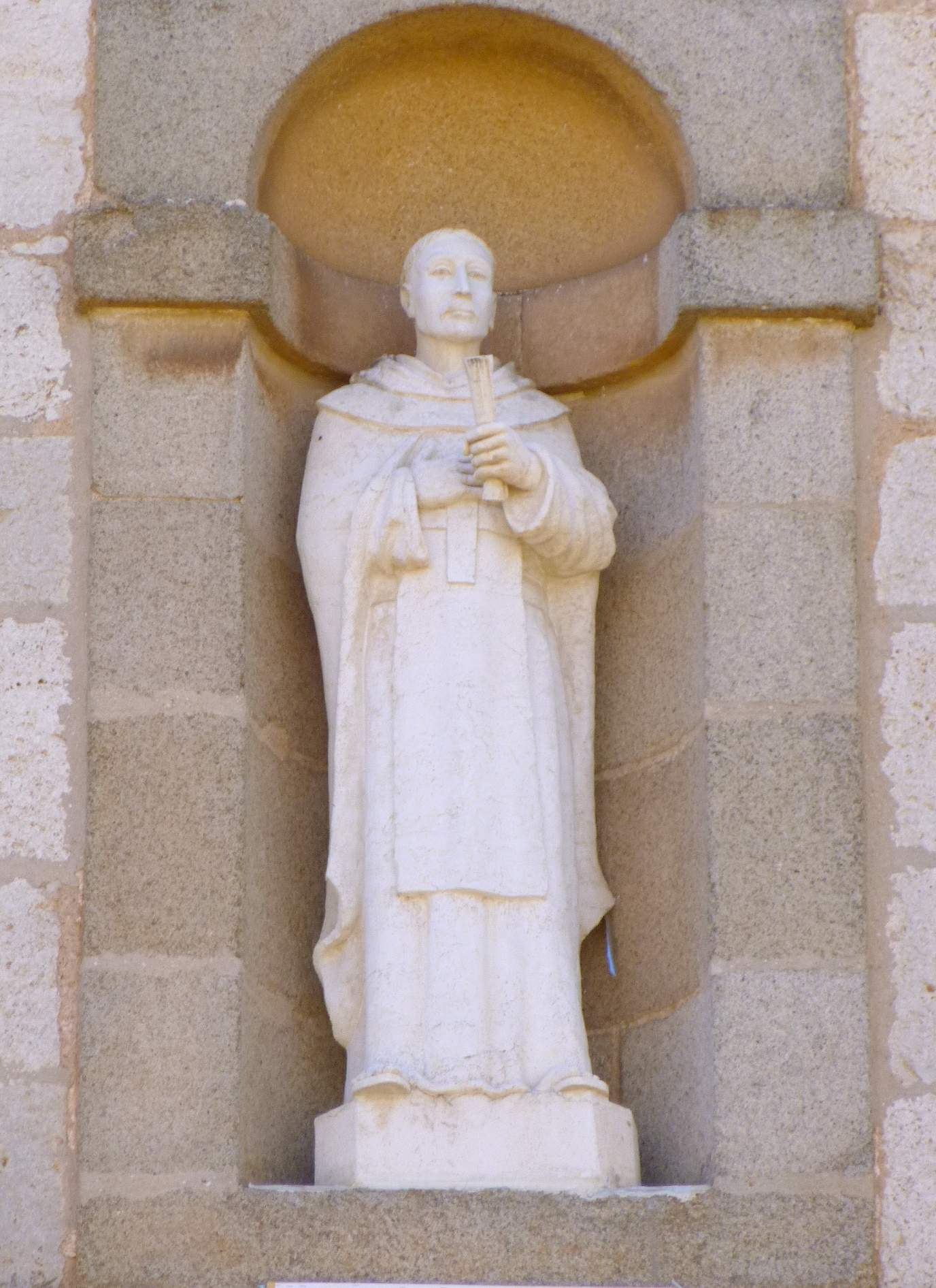 Convento de los Trinitarios (Valdepeñas)